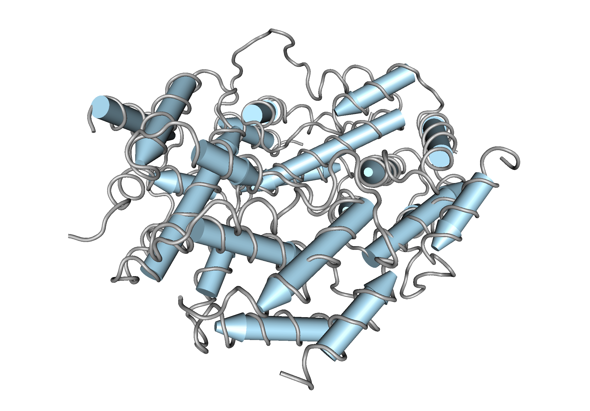 1HIG_Interferon-Gamma